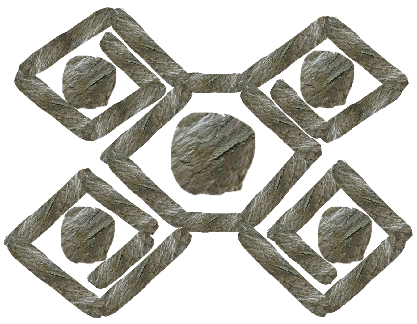 juanjui